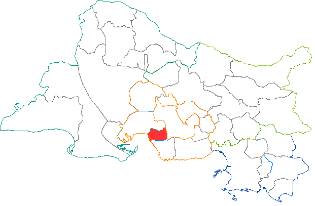 Situation du canton dans le département des Bouches du Rhône (France)